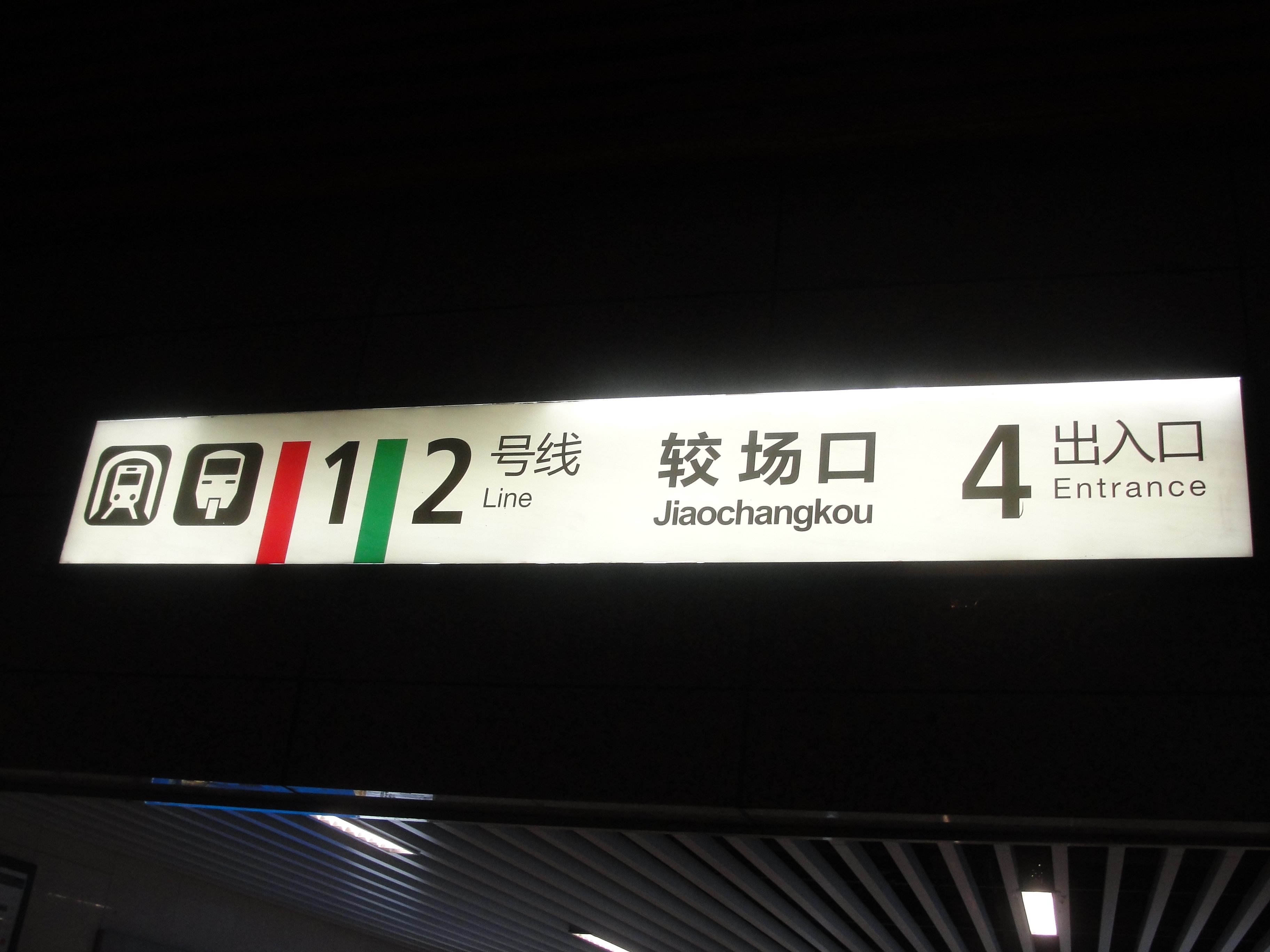 轨道交通一号线较场口站和平路出口，图中可见有地铁与轻轨的图案，代表可在站内换乘一号线及二号线